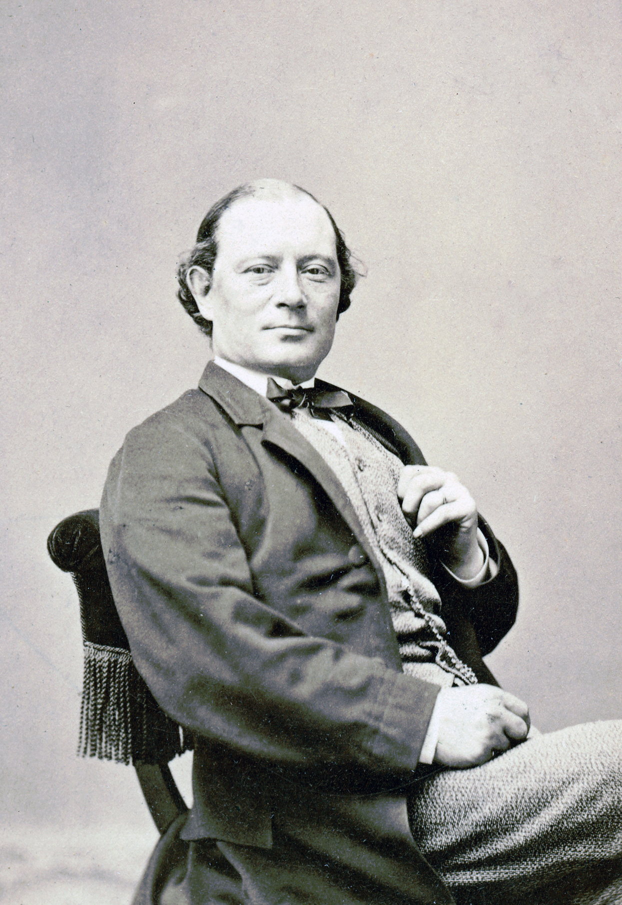 Constantin Rohde, skådespelare vid Södra teatern 1863